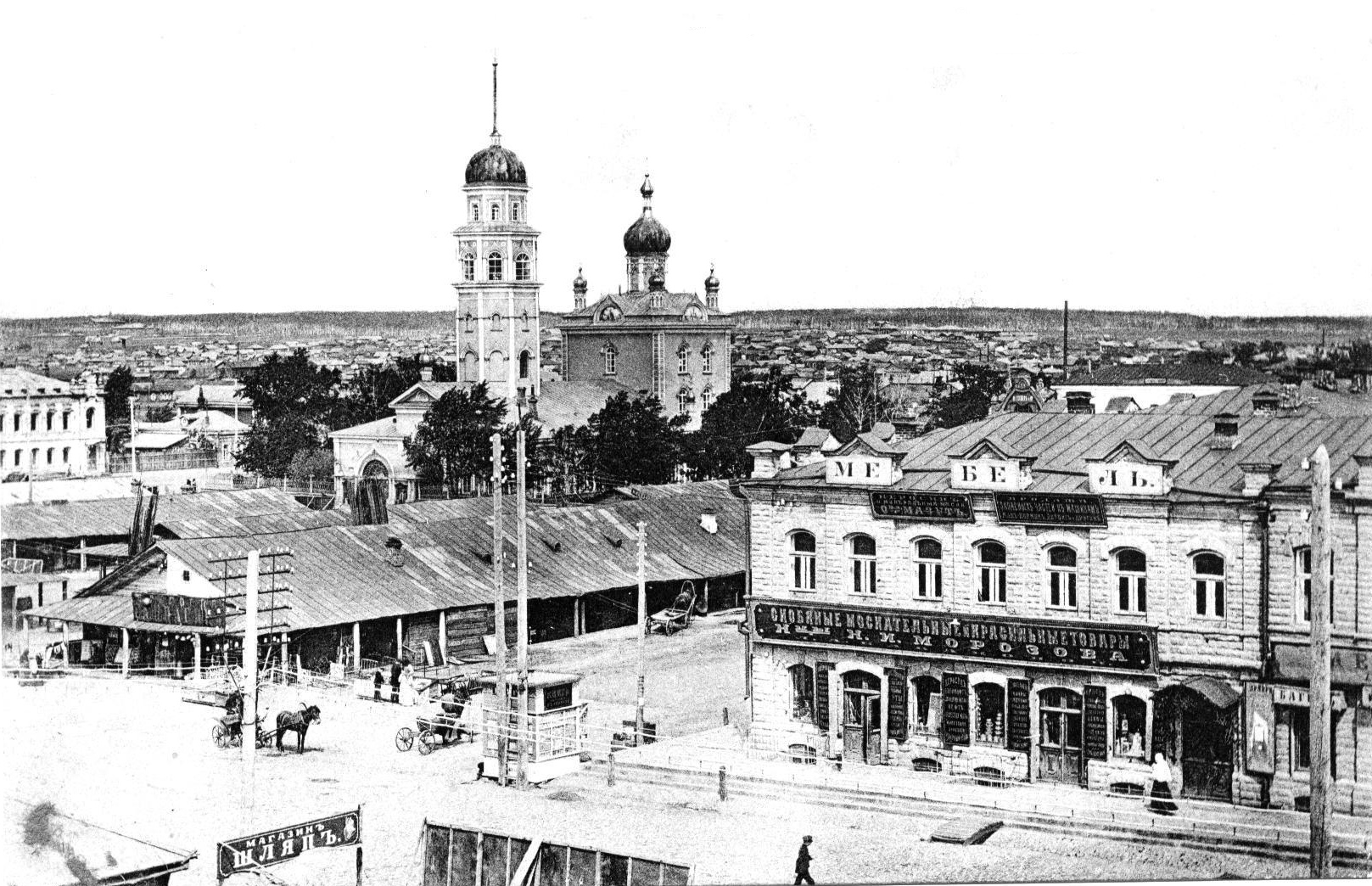 Челябинск. Общий вид с запада. Начало XX века.